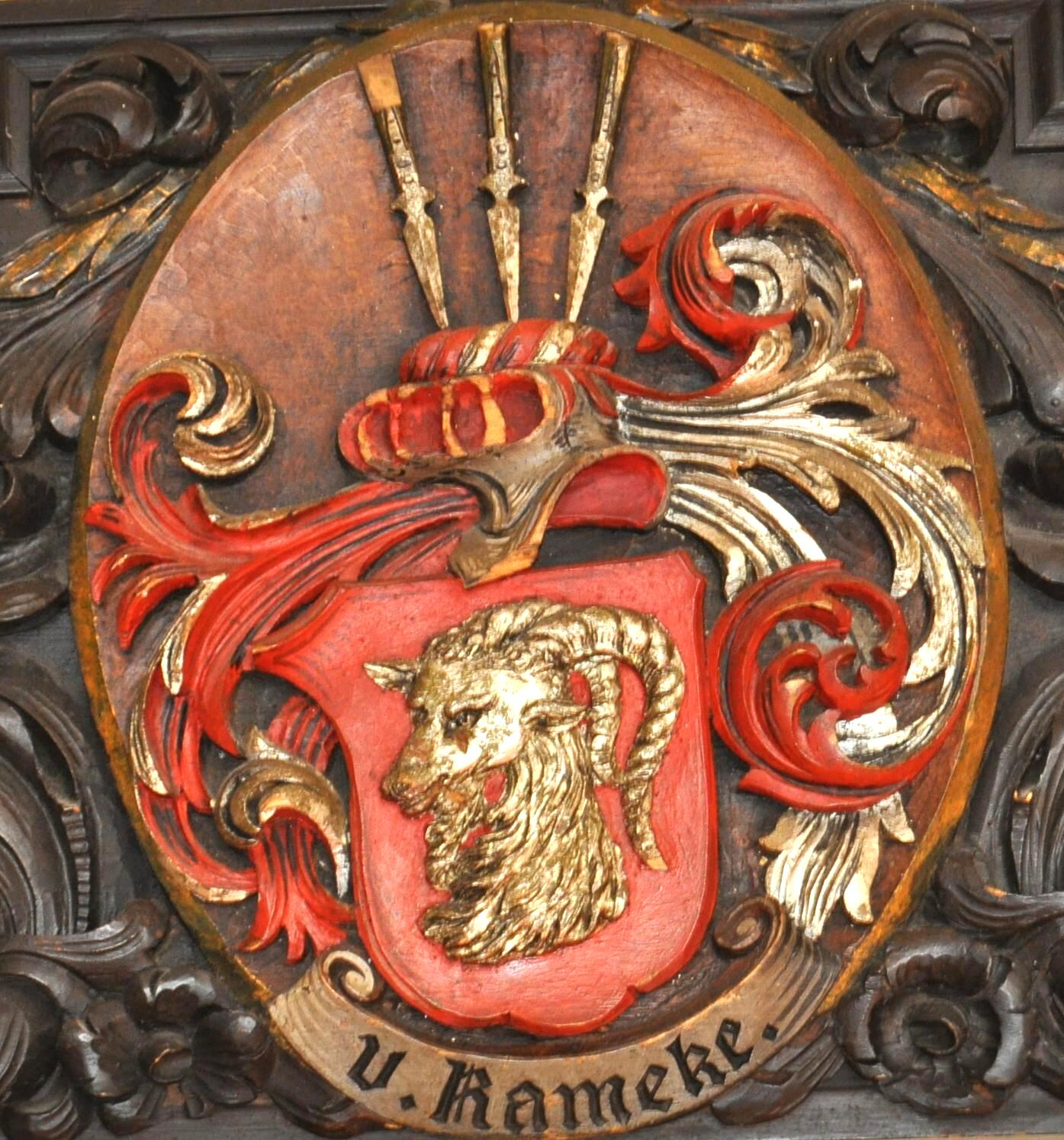 Wappen der Familie von Kameke